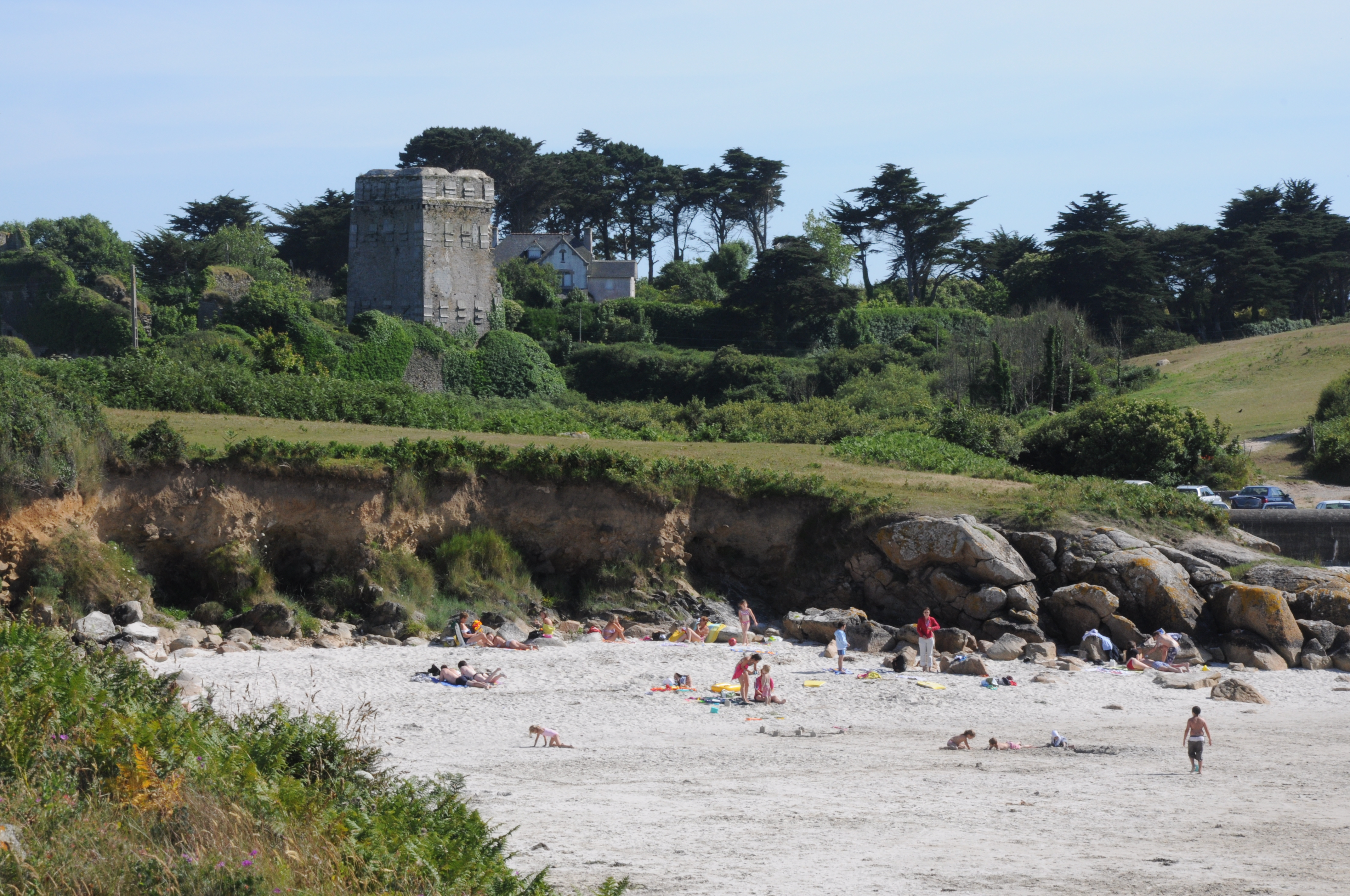 Les ruines du château fort médiéval de Trémazan au dessus de la plage à LANDUNVEZ